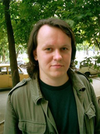 Алексей В. Цветков